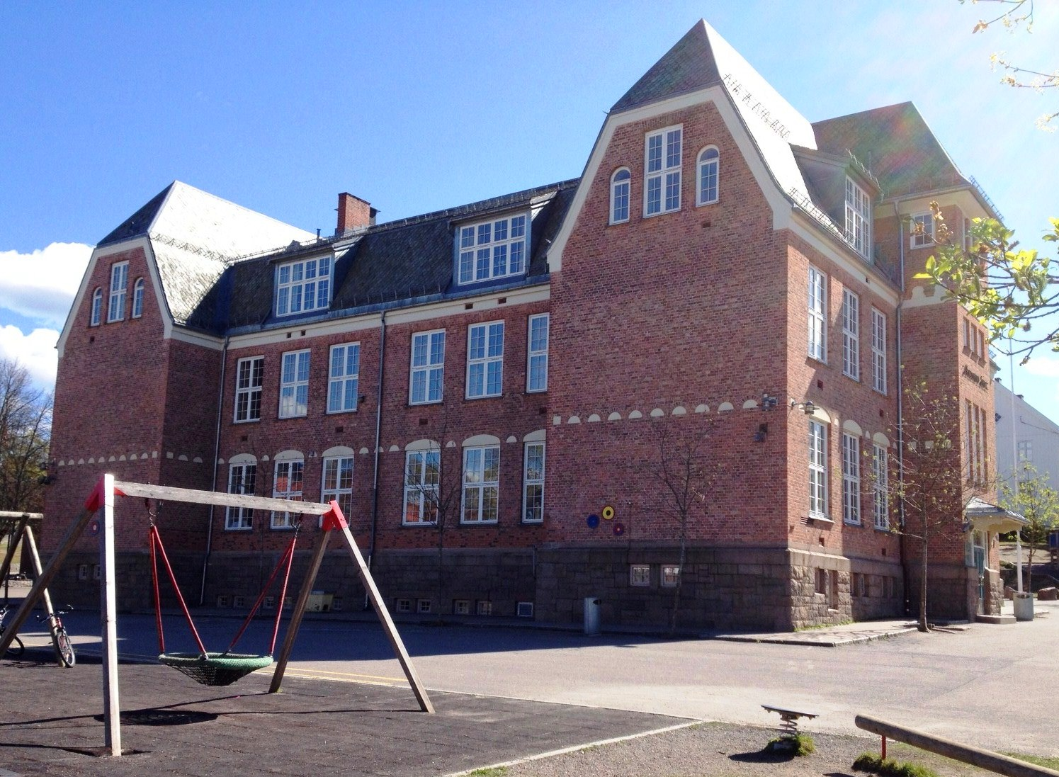 Nordstrand skole, eldste bygning, Oslo